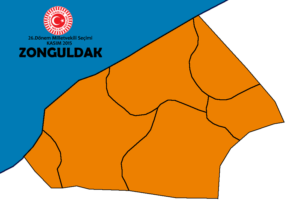 Kasım 2015 Seçimleri